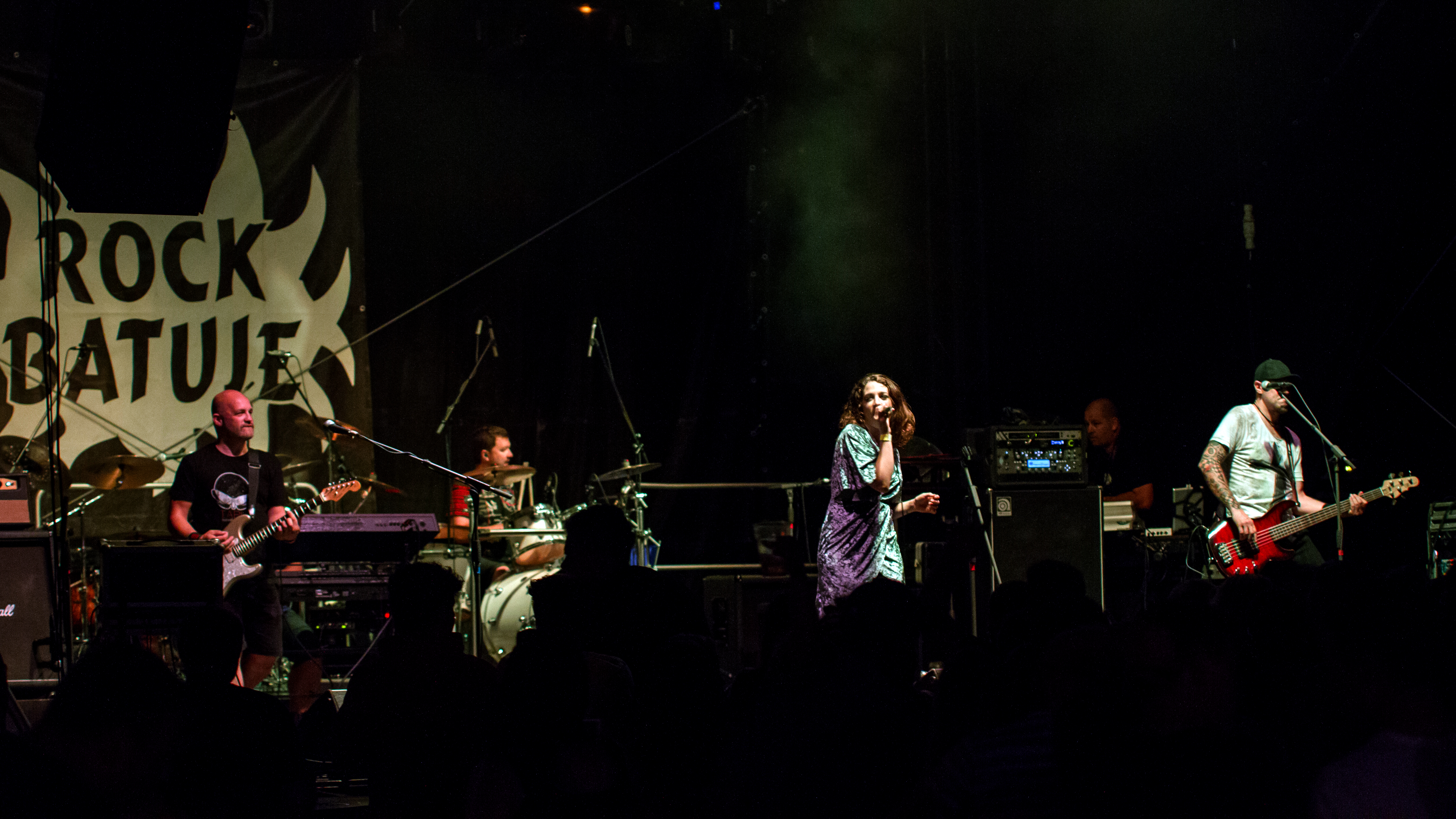 Skupina Tabu, Rock Batuje 2017